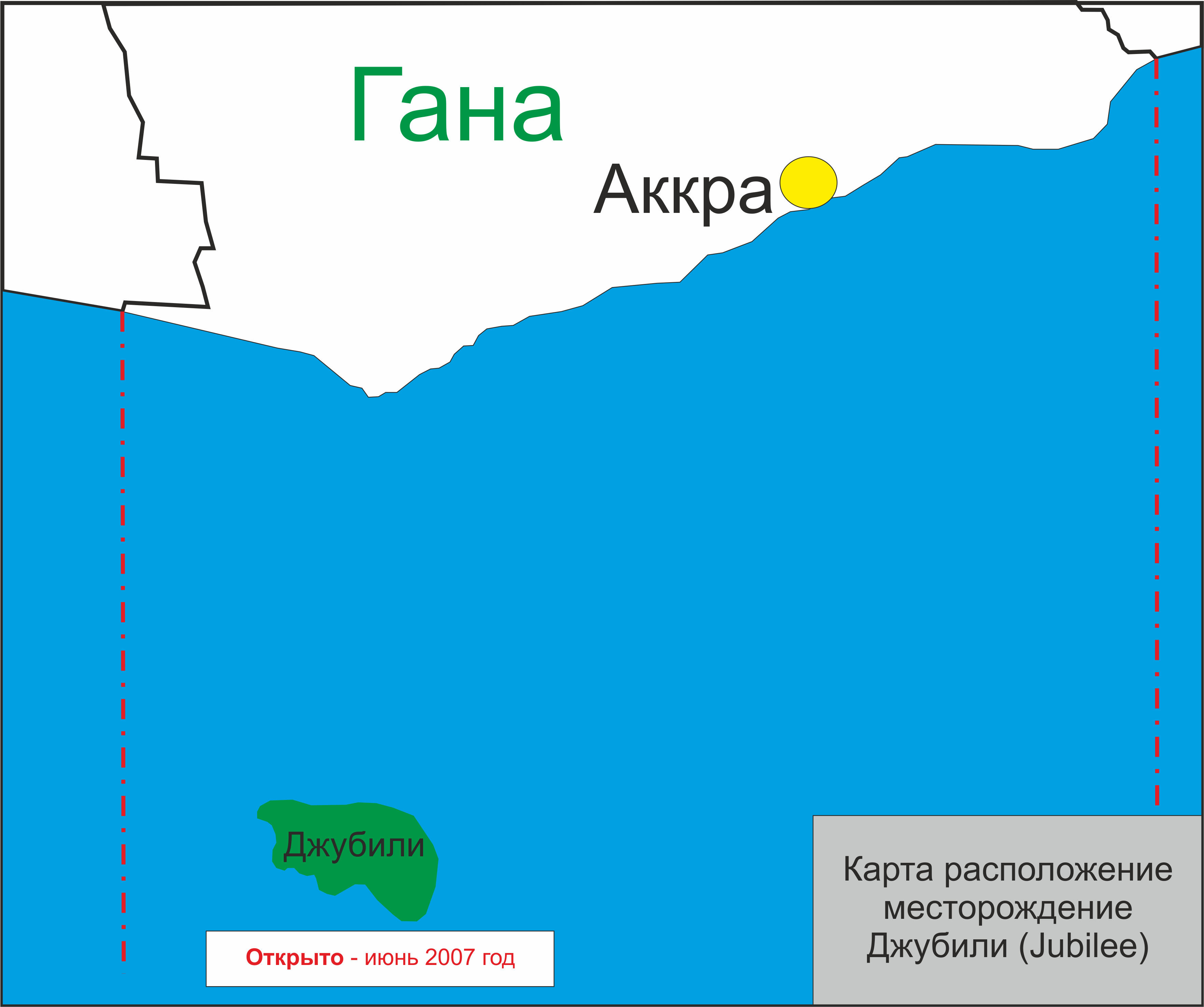 Карта расположение месторождение Джубили